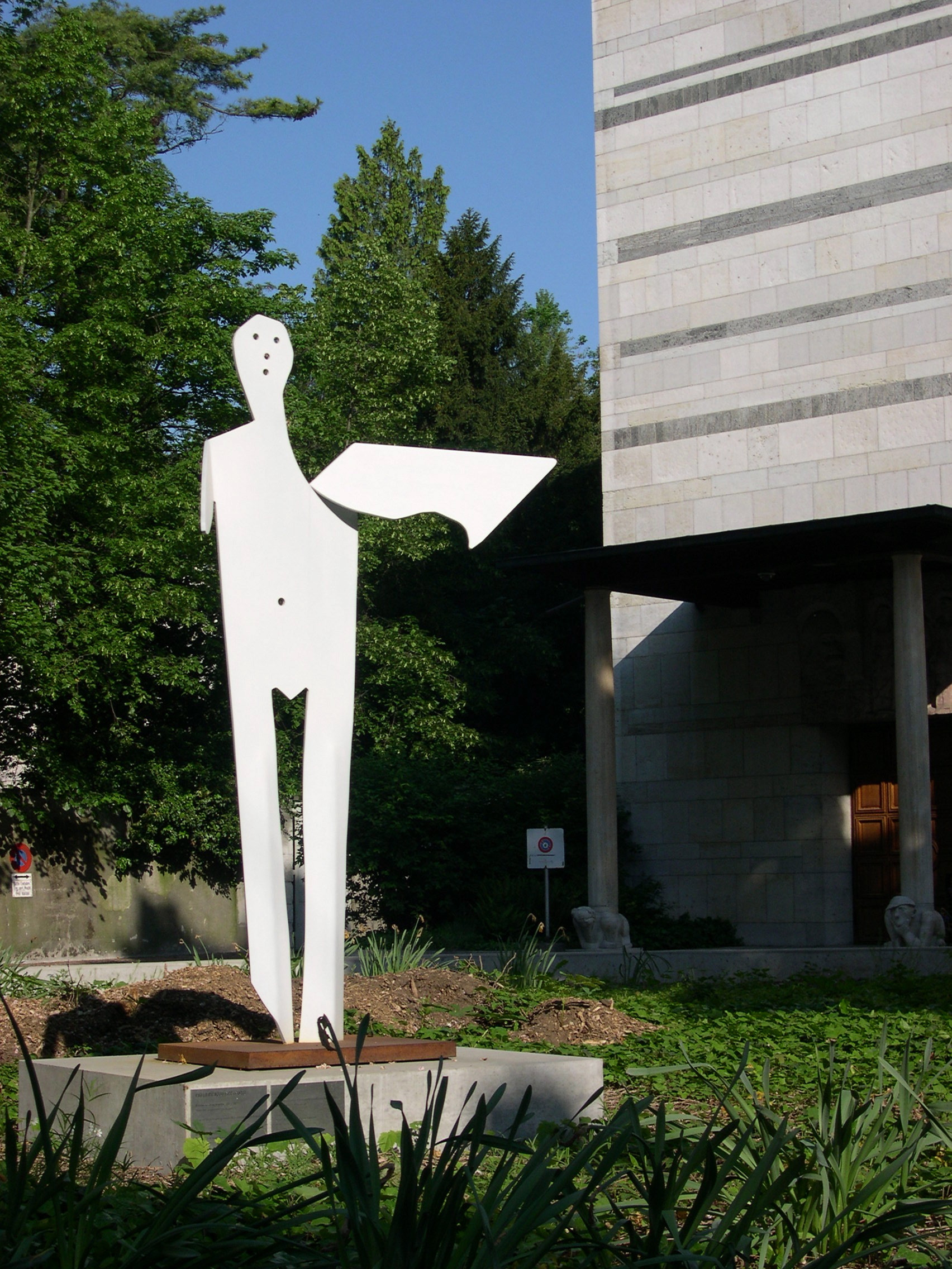 Vergrösserung der Picasso-Skulptur Homme aux bras écartés (1961) auf dem Picassoplatz in Basel hinter dem Kunstmuseum Basel. Das rund 13 cm hohe Original wurde dem Museum 1980 von Picassos Enkel geschenkt. Eine 8 m hohe, 62-fache Vergrösserung (geschenkt von der Schweizerischen National-Versicherungs-Gesellschaft), die seit 1992 zuerst auf dem Platz stand, wurde wegen ihres schlechten Zustands und ihrer Überdimensionierung 2006 abgebrochen und 2007 durch eine 1,95 m hohe Vergrösserung (wiederum (geschenkt von der Schweizerischen National-Versicherungs-Gesellschaft) ersetzt. Siehe auch [1].